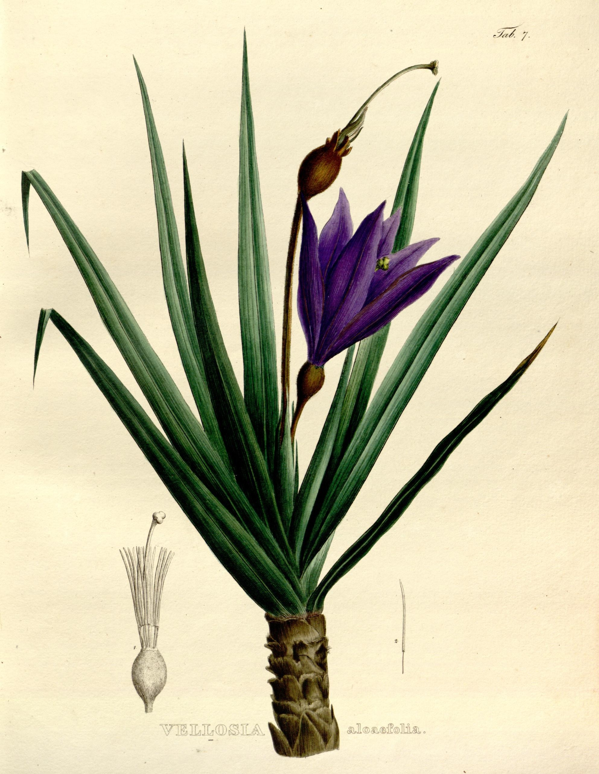 Vellosia aloaefolia = Vellozia aloifolia Nova genera et species plantarum. Monachii [Munich] :Impensis Auctoris,1824-1829 [i.e. 1824-32]..